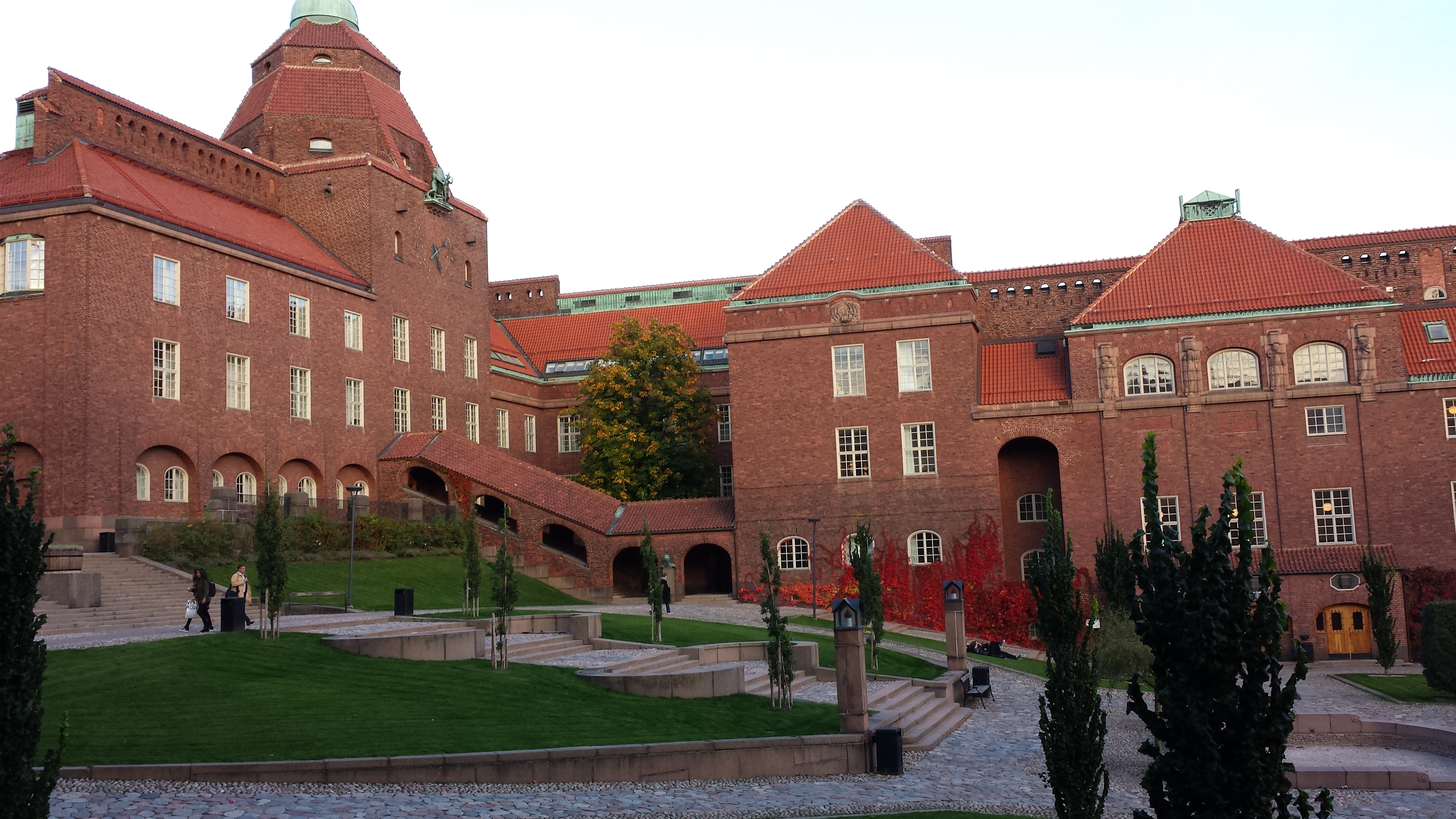 Kungliga tekniska högskolan (Norra Djurgården 1:49, f.d. Norra Djurgården 1:1)